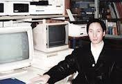 戴峰、東北大学理学部研究室にて写真撮影。